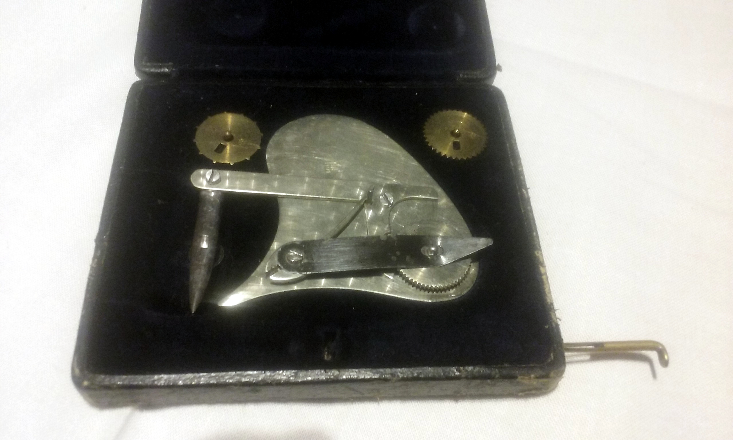 Trazador de tipos de línea automático (E.O. Richter